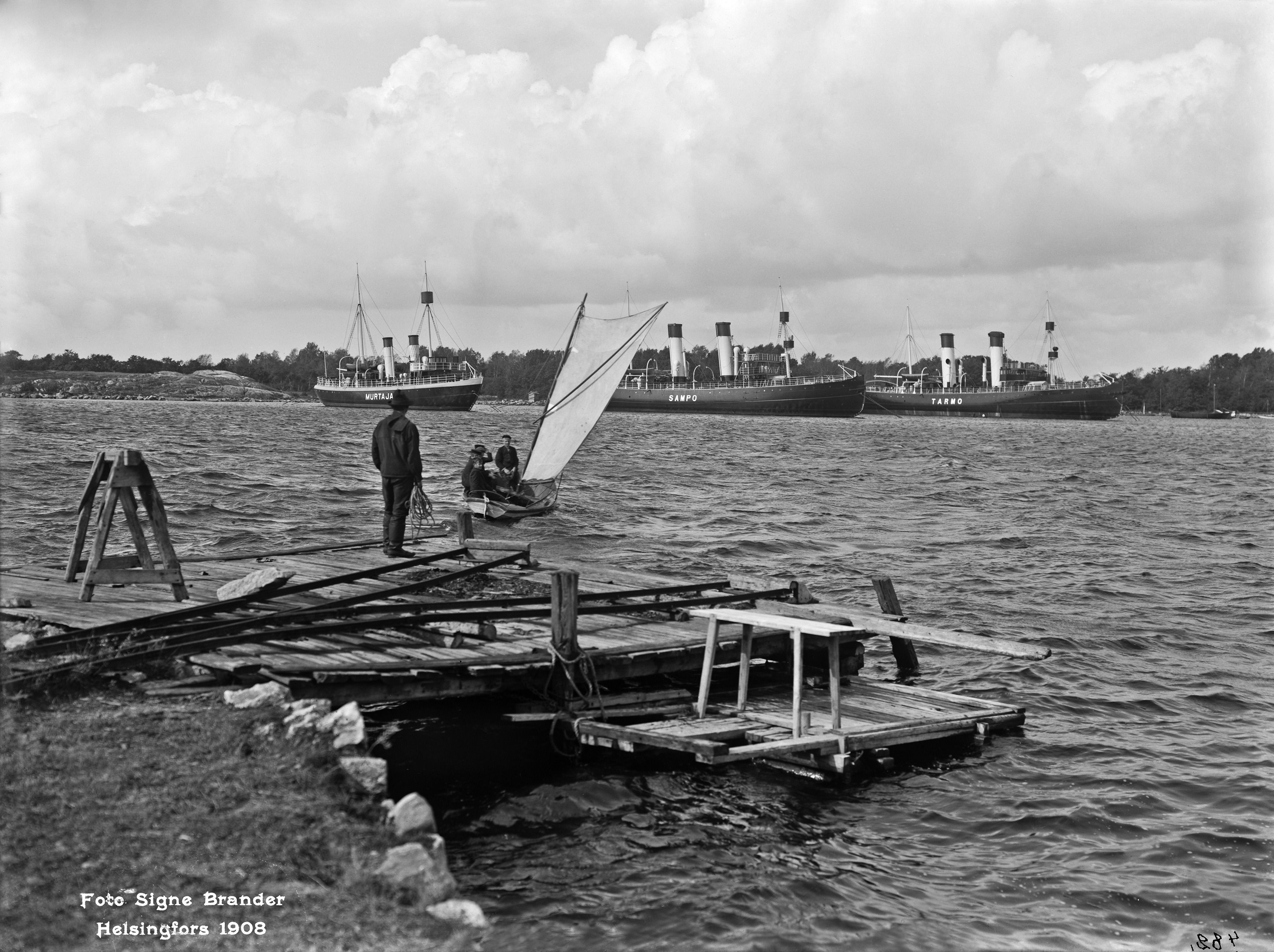 Hietalahden satamaa nähtynä Munkkisaaren kärjestä. Jäänmurtajat Murtaja, Sampo ja Tarmo. Taustalla Jätkäsaari. -- negatiivi ja vedos, lasi paperi pahvi, mv